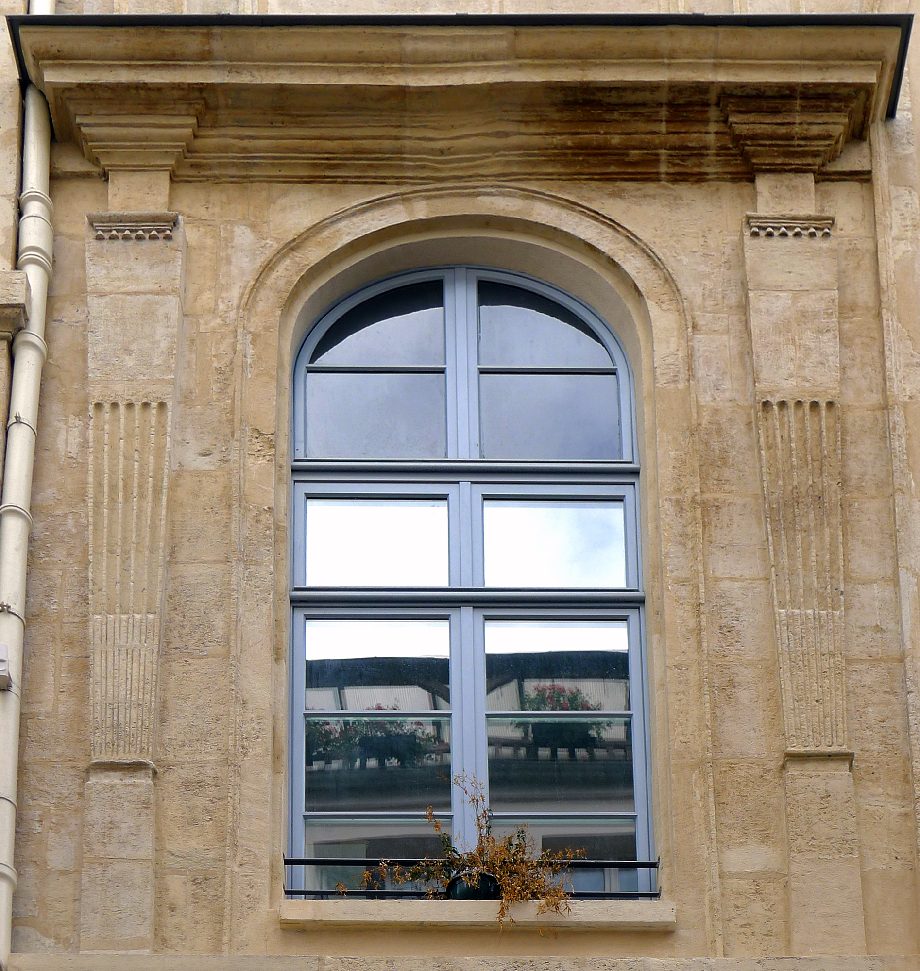 Rue des Orfèvres (n°8 : ancienne chapelle Saint-Éloi, détail) - Paris Ier .